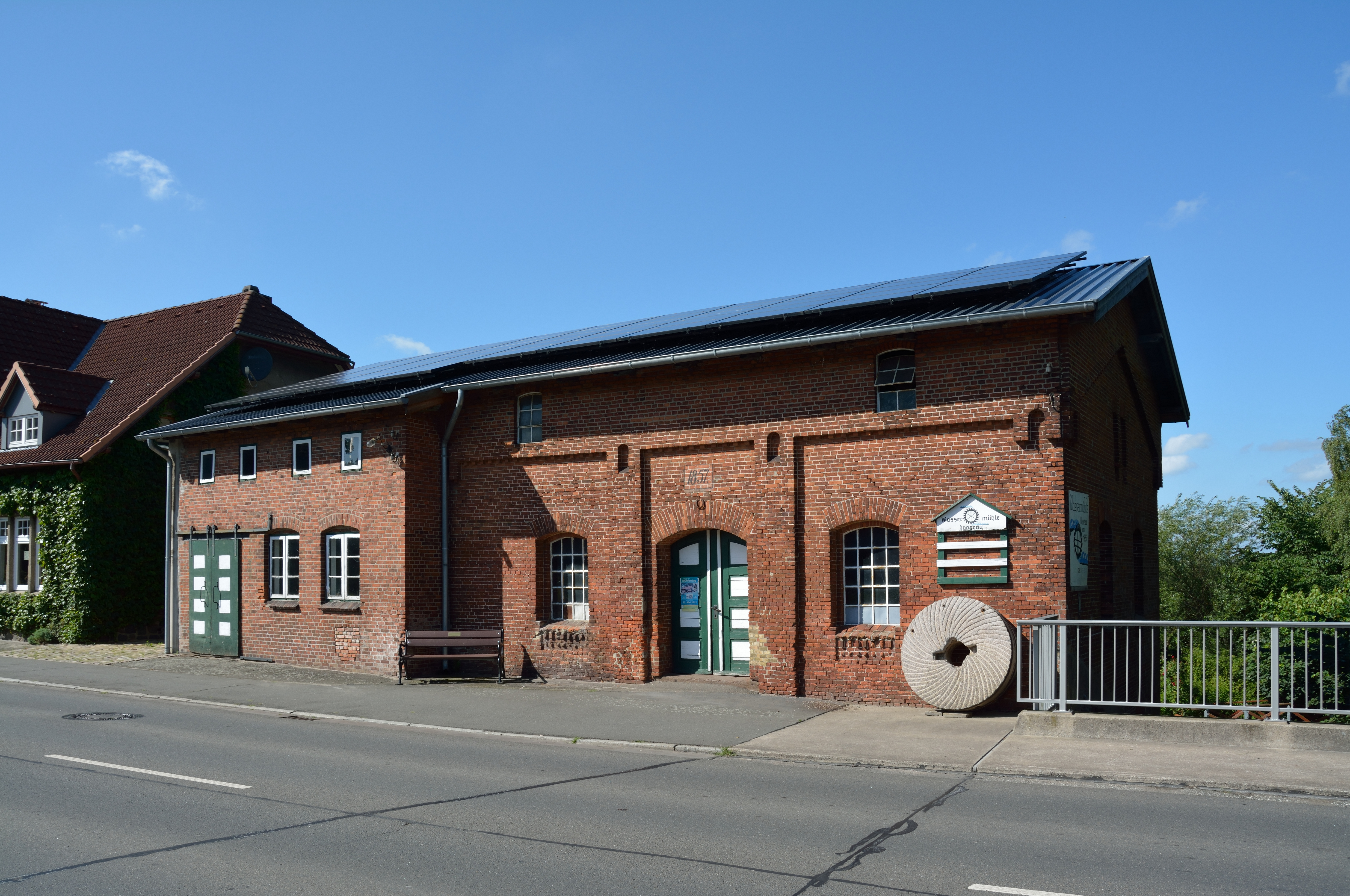 Fotos der Hanerau. Die alte Wassermühle.